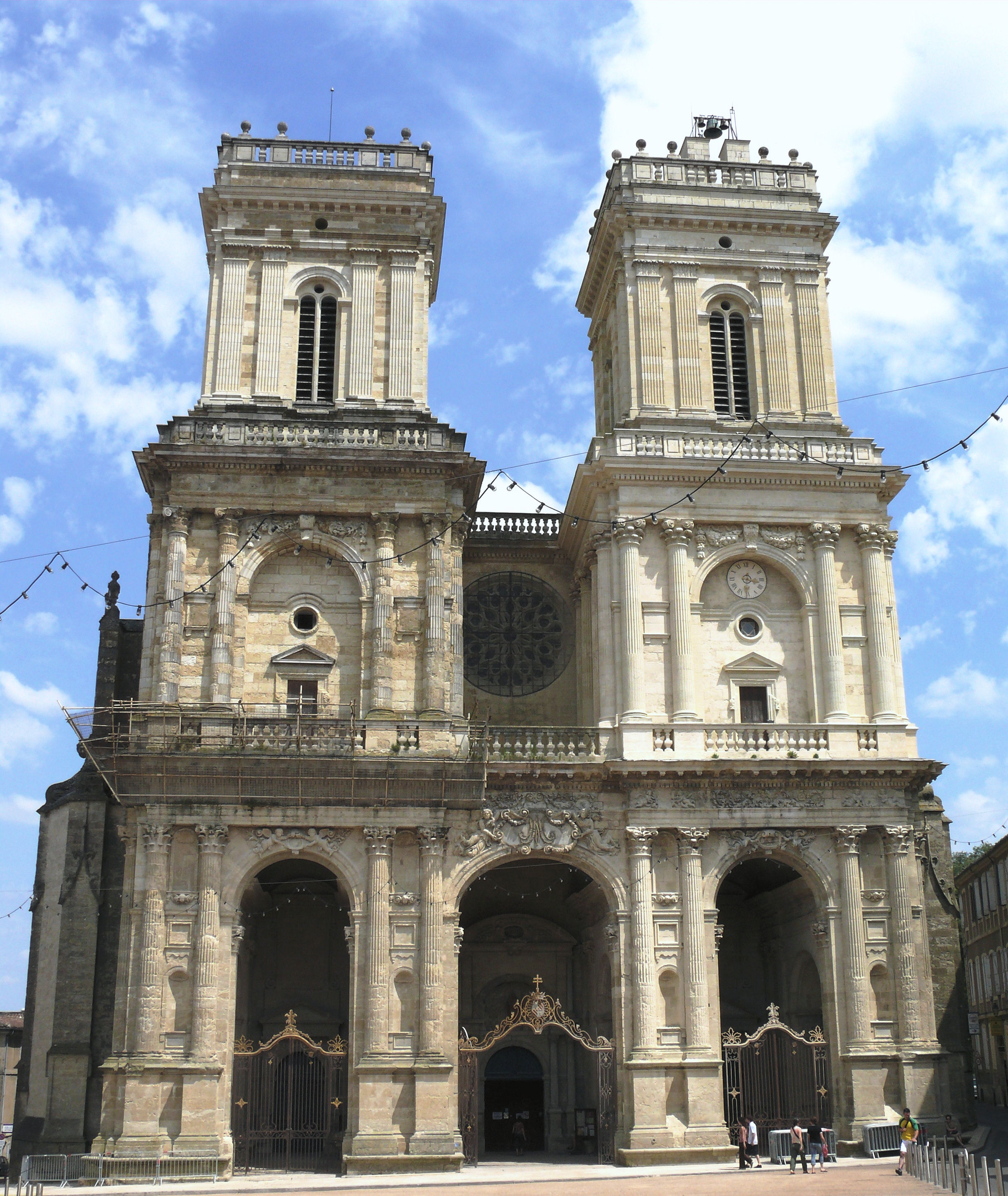 Auch - Cathédrale Sainte-Marie - Façade occidentale